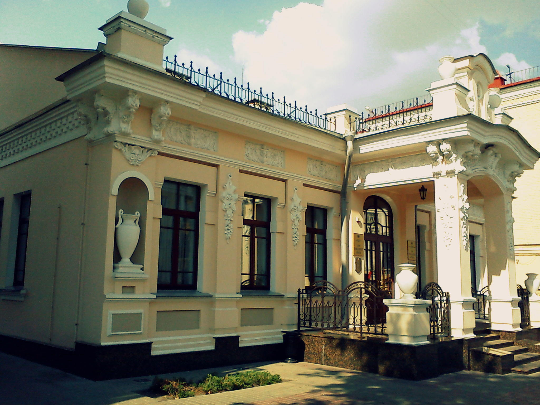 Дом Гражданских Обрядов в Гомеле, Белоруссия